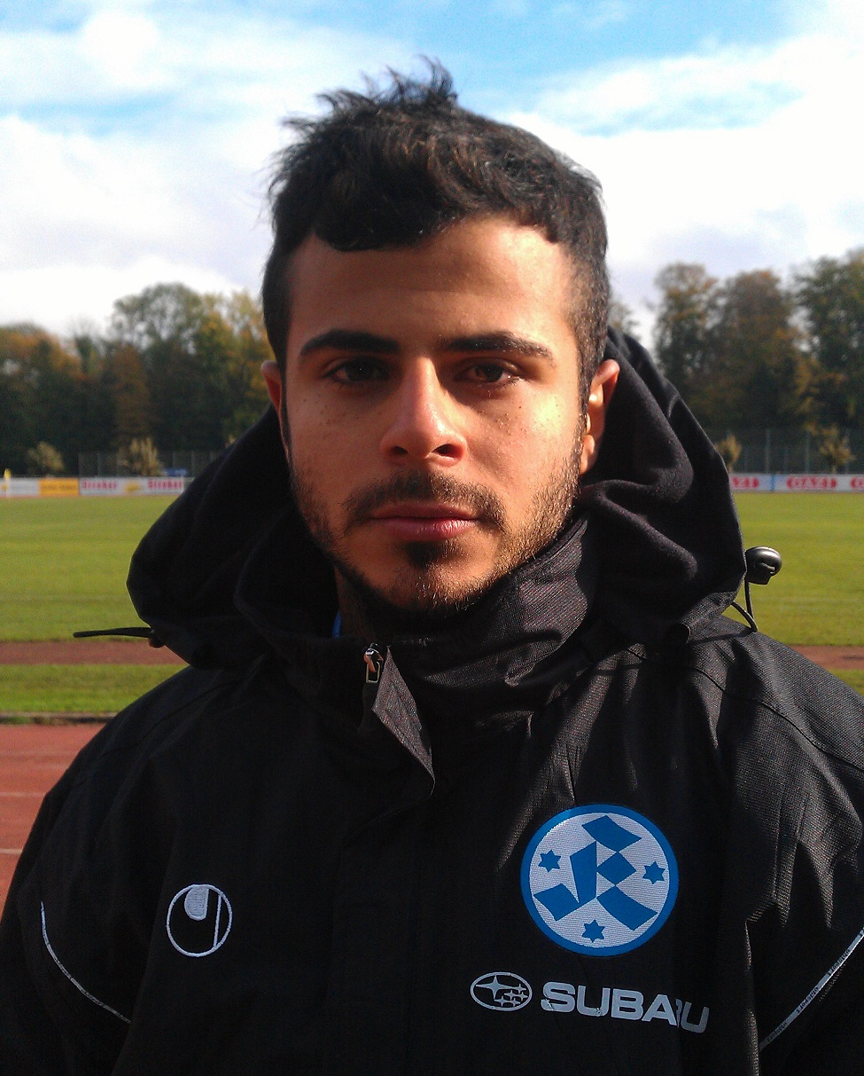 Abdulsamed Akin